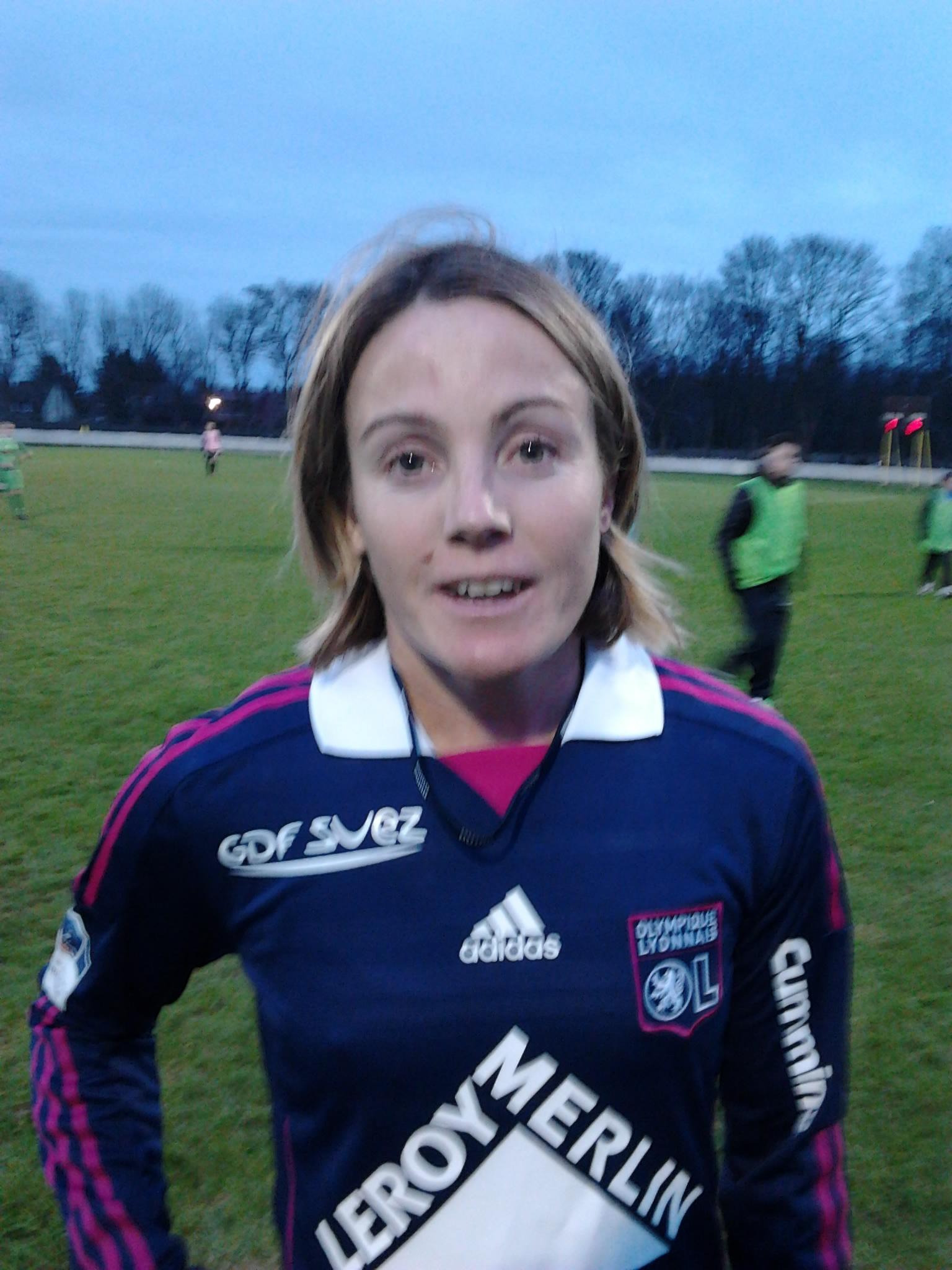 Photo de Sonia Bompastor après le match FCF Hénin-Beaumont/Lyon (1-6) le 12 décembre 2011 au Stade Octave-Birembaut.